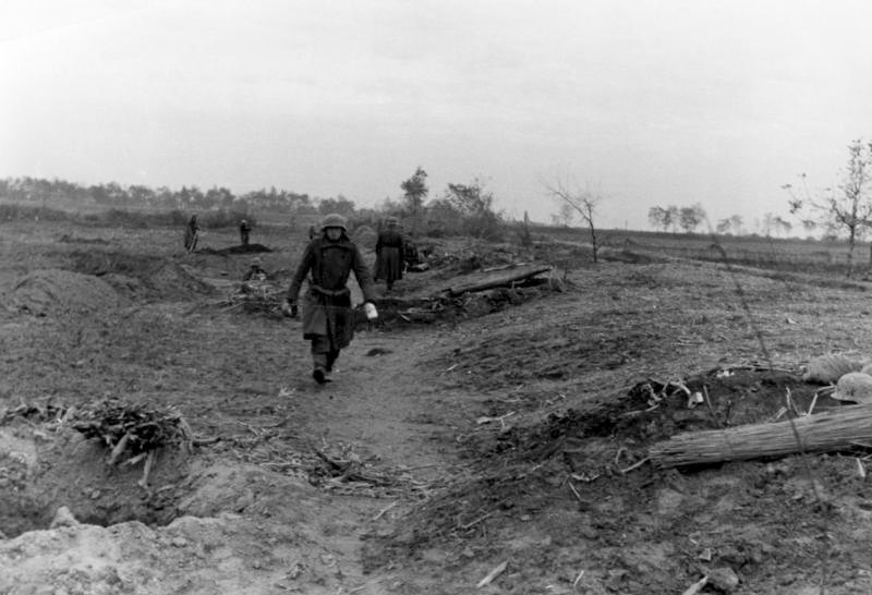 Ungarn, November 1944 Der Kampf vor den Toren von Budaperst In den Stellungen der deutschen und ungarischen Einheiten, die die Hauptstadt vor den Anstürmen der Sowjets verteidigen. Alle Angriffe wiesen sie bisher blutig ab. SS-PK: F. Fritsch 184/25 T.3621